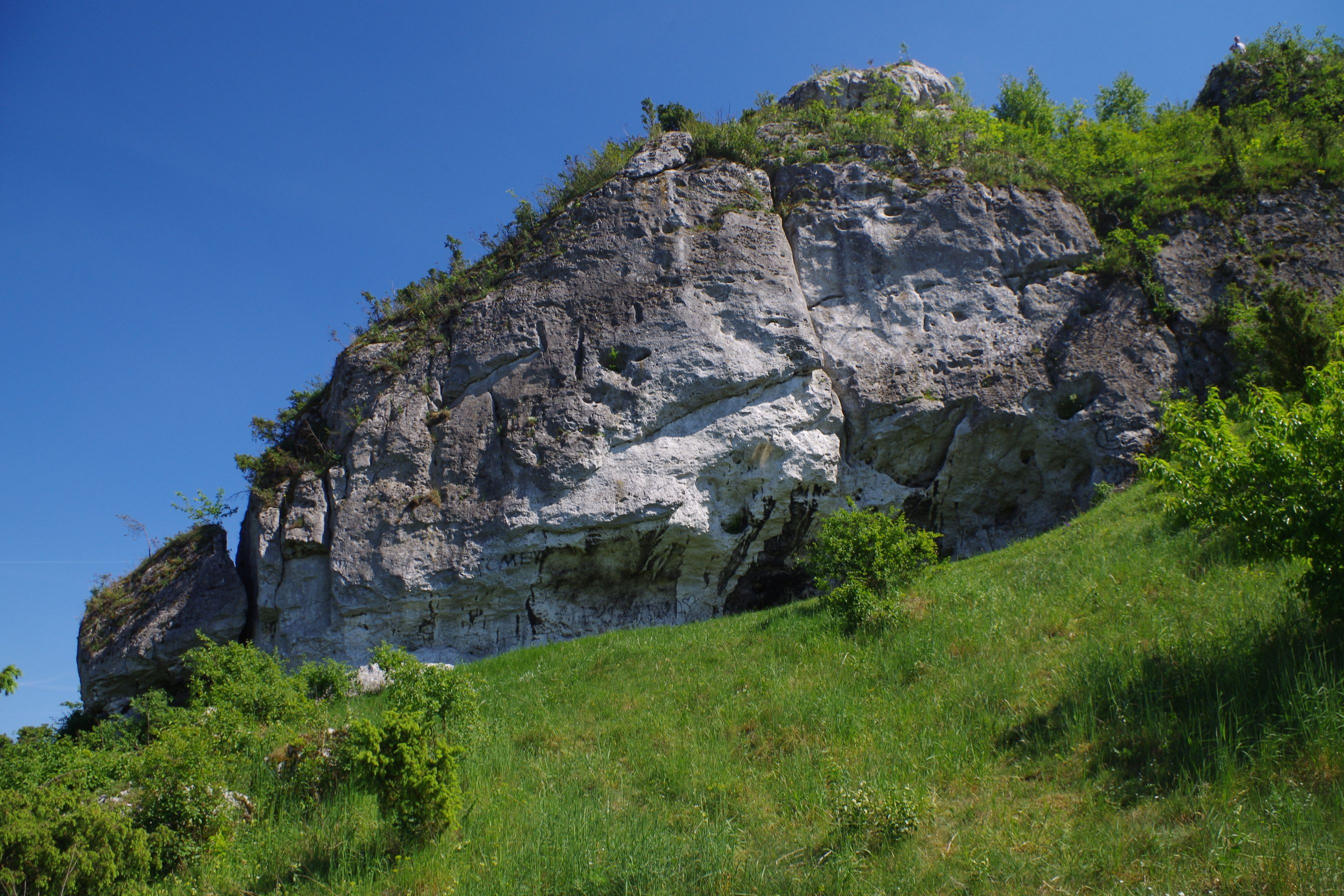 Podcięta Turnia na Lipówkach w Olsztynie